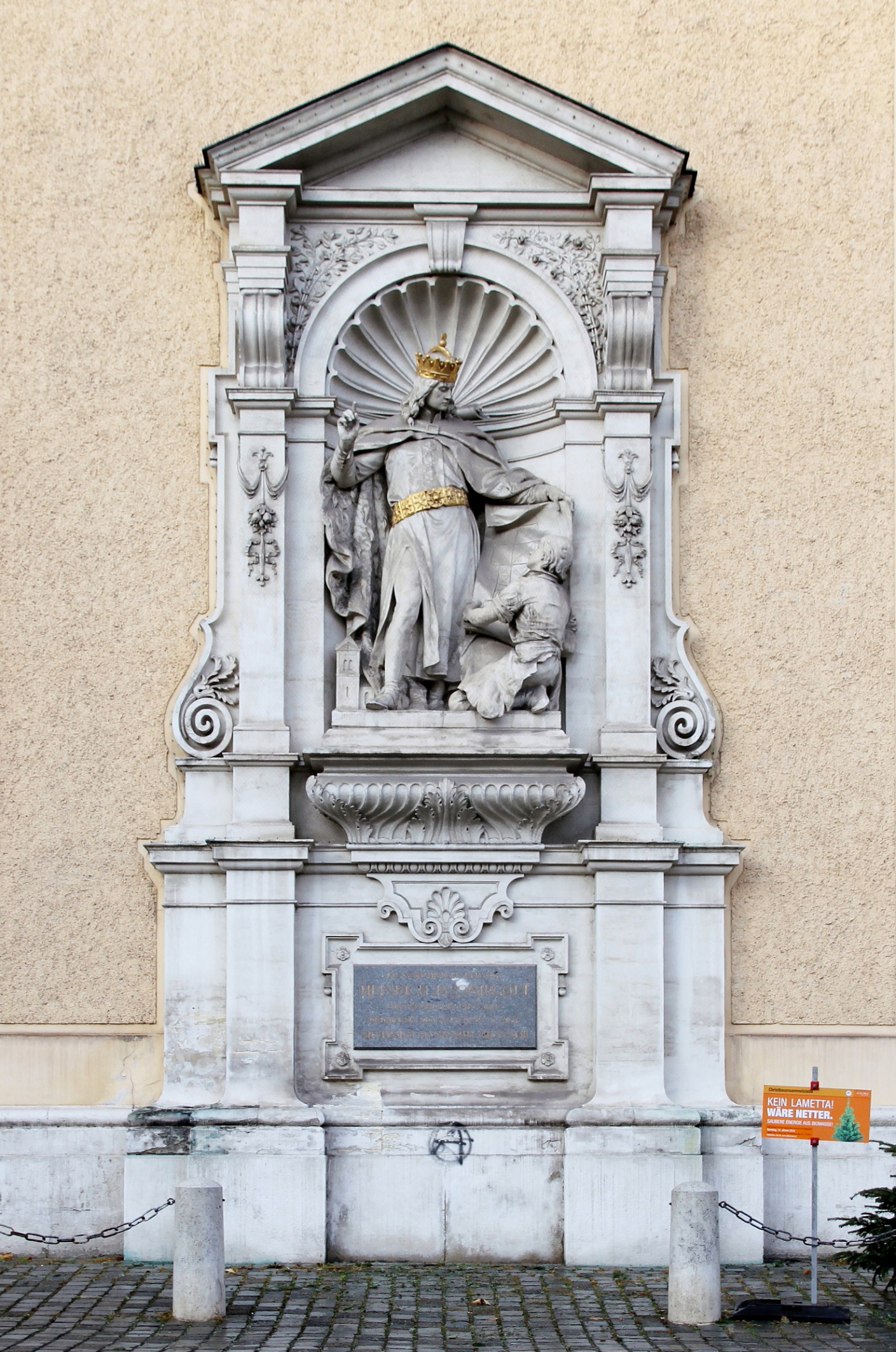 Standbild von Heinrich II. (Jasomirgott), dem Gründer des Schottenstiftes in Wien, an der südseitigen Außenwand der Stiftskirche. 1893 vom Bildhauer Josef Breitner (1864-1930) gefertigt.